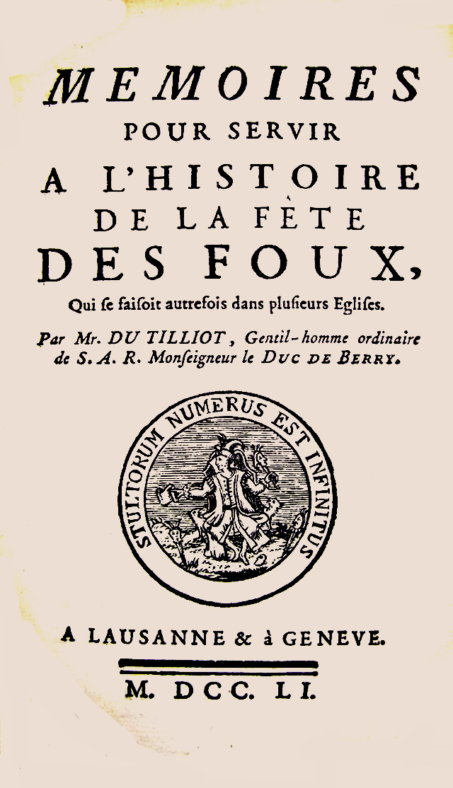 Mémoire pour servir à l'histoire de la Fête des fous, Lausanne et Genève, 1751